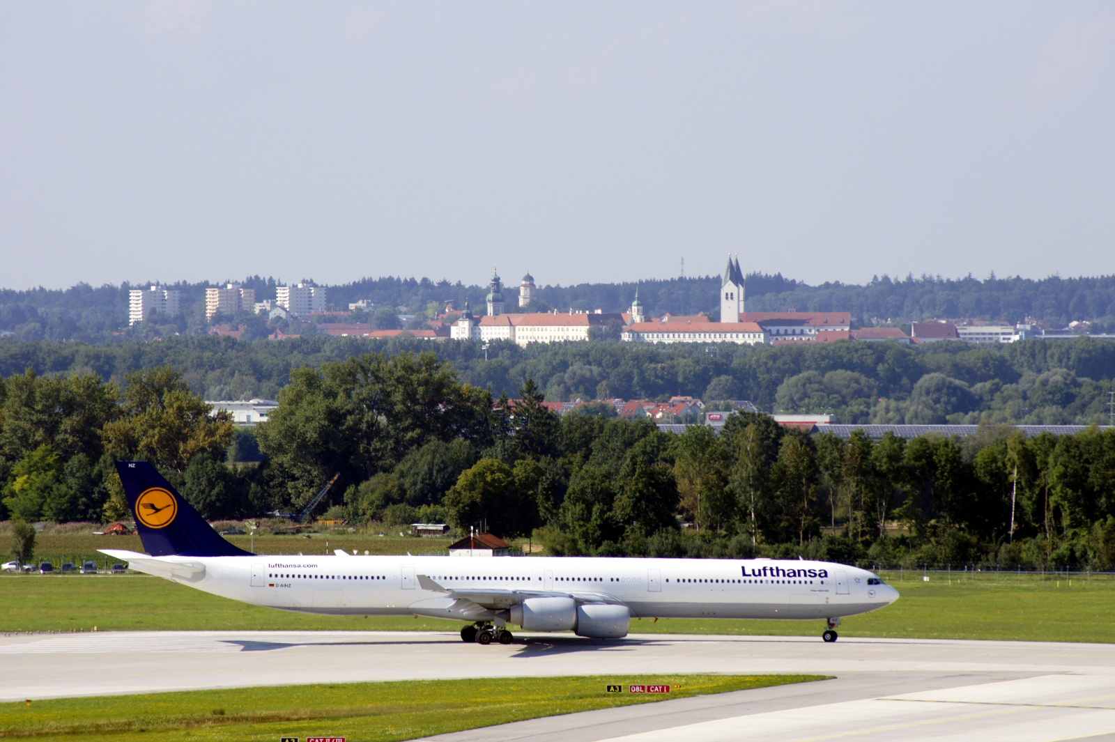 Lufthansa D-AIHZ, Airbus A340-642X, 22. August 2010, München MUC.